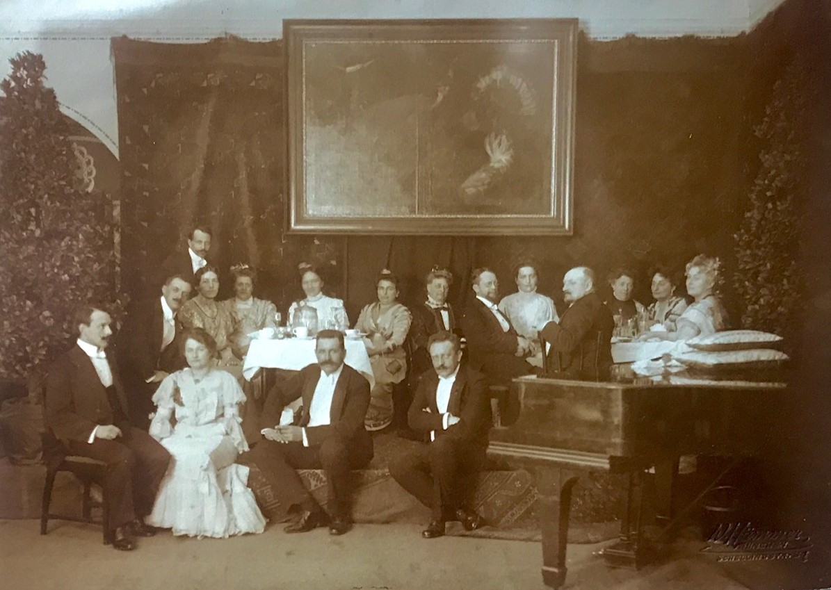 Group picture Haindl and wife with other artists